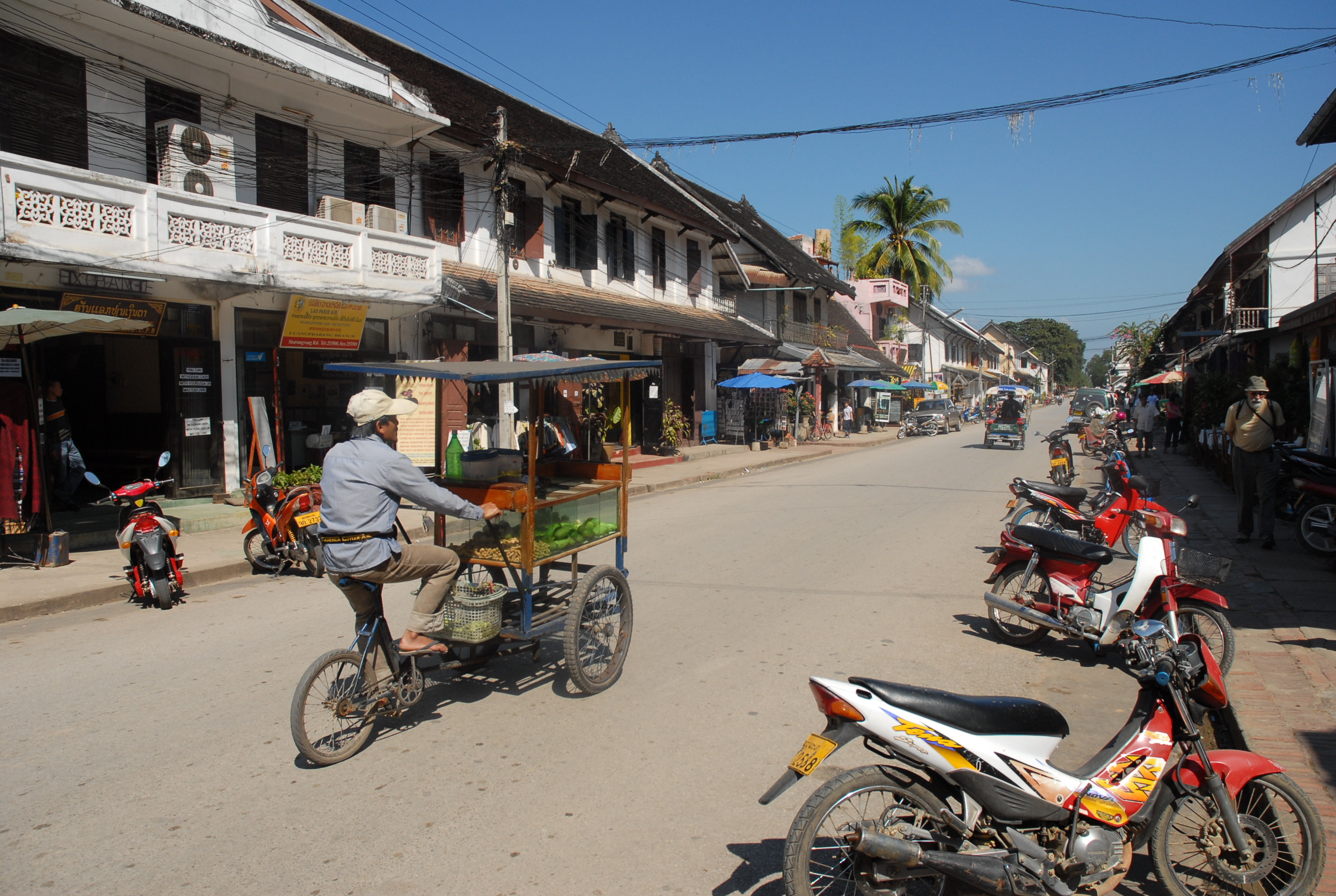 Luang Prabang : rue principale du centre historique